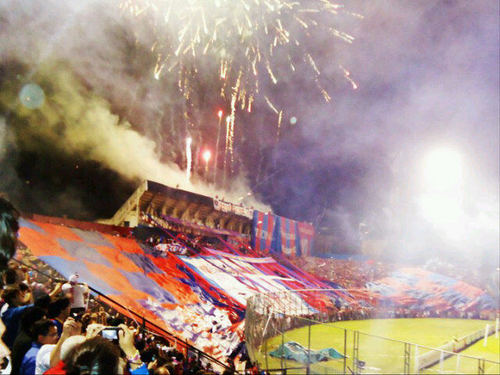 La Hinchada del Club Cerro Porteño de Paraguay